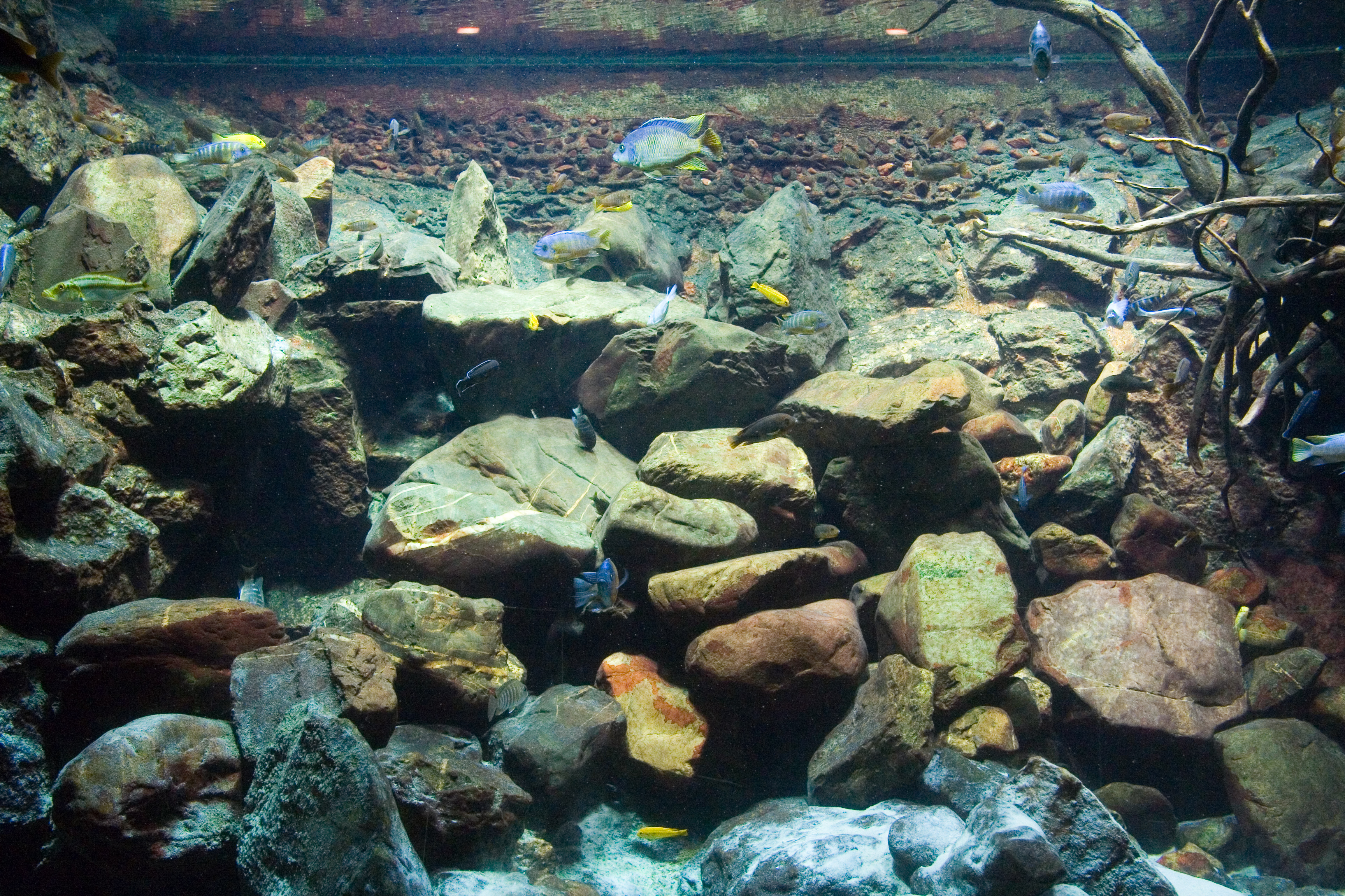 Aquarium